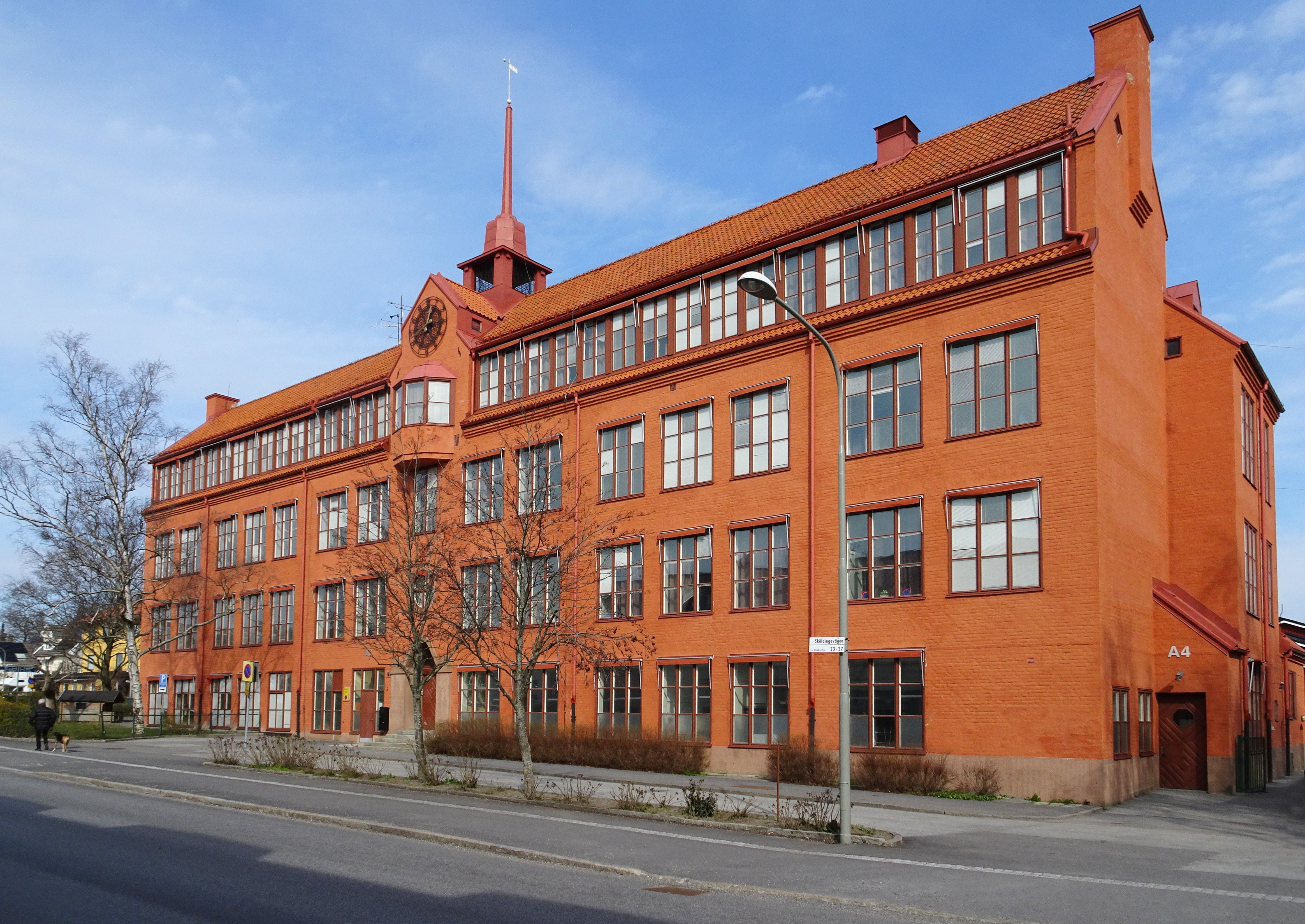 Örby nya skola "Stenskolan" byggår 1915, arkitekt Georg A. Nilsson